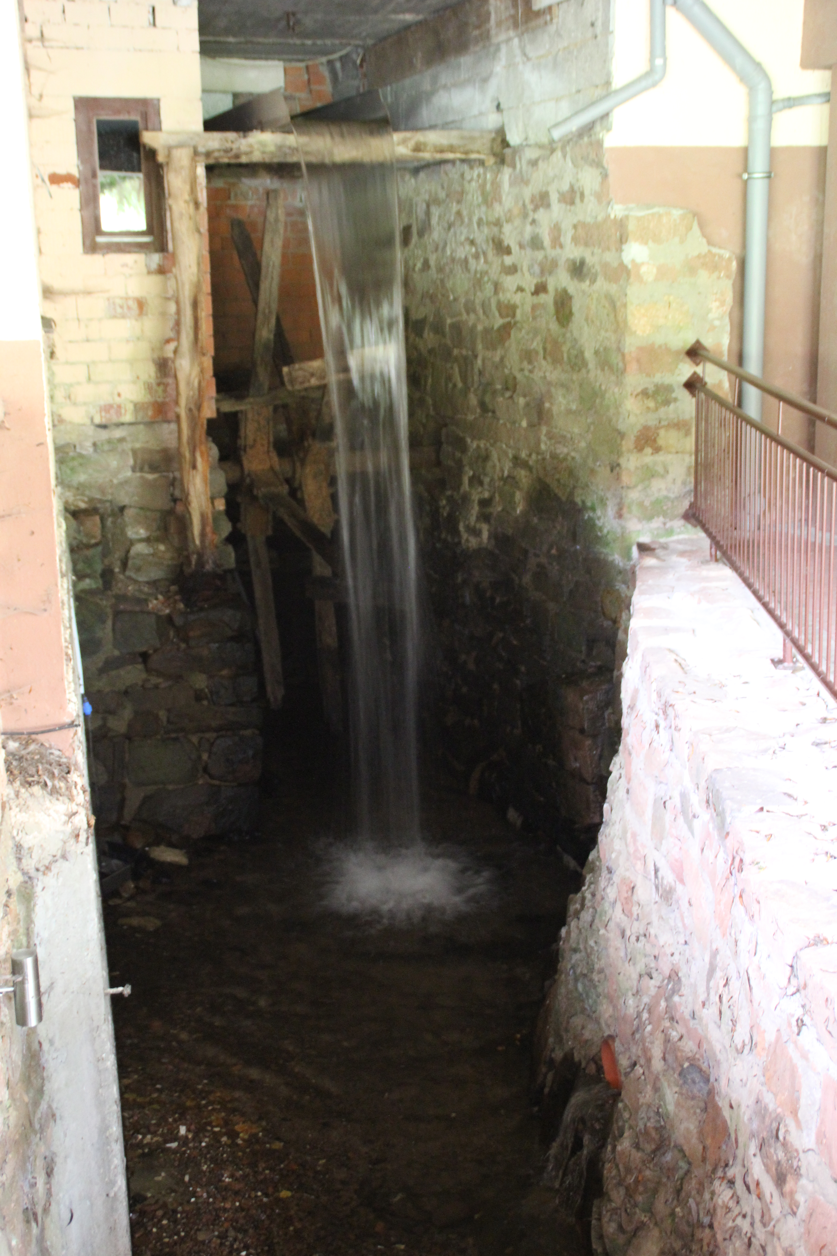 Das zerfallene ehem. Mühlrad der Kahlmühle im Jahr 2019. Nur Wellenbaum und Achse sind teilweise erhalten